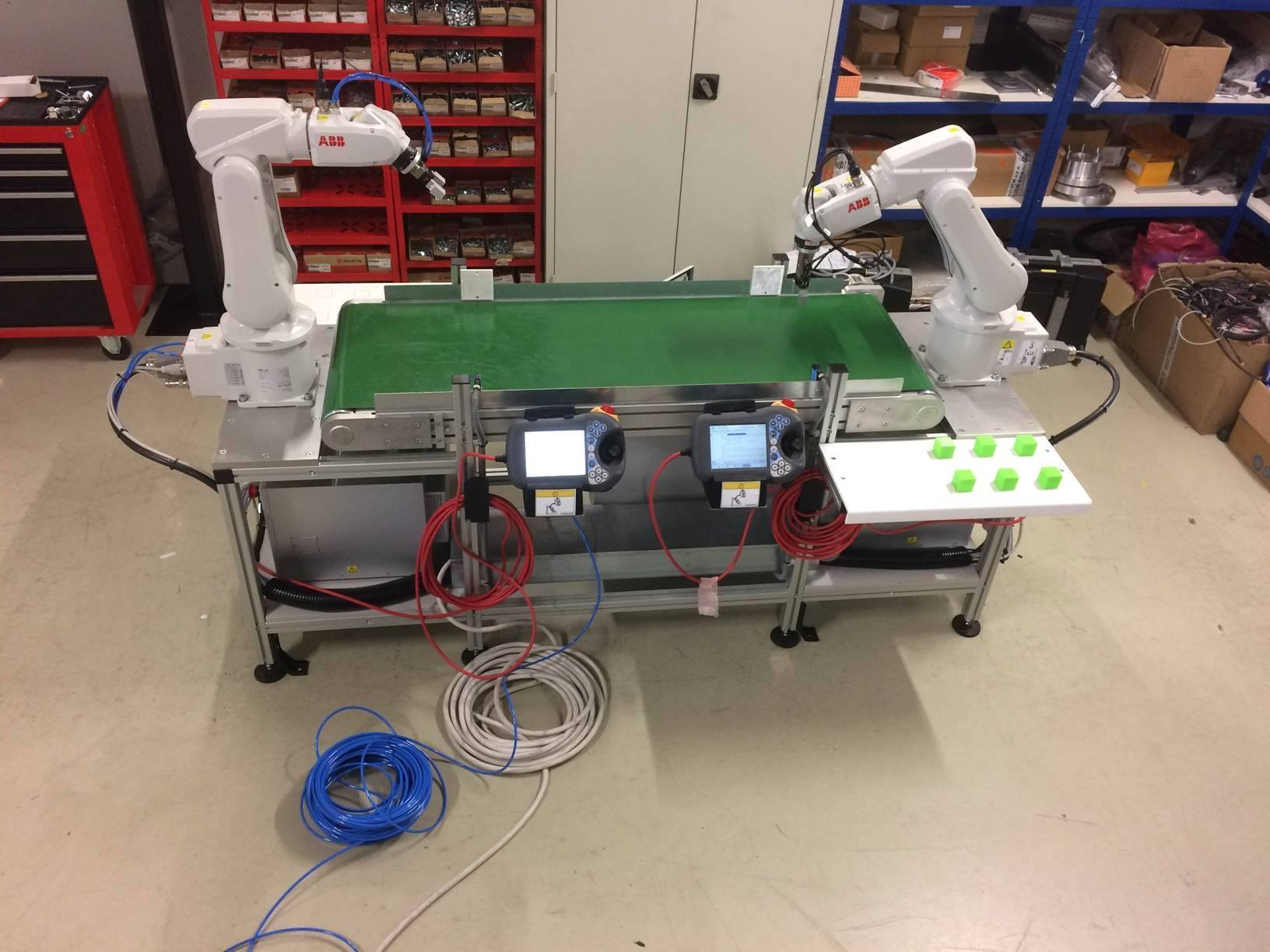 Mechatronizovaná linka ABB - SSOŠ Polytechnická v Nitre